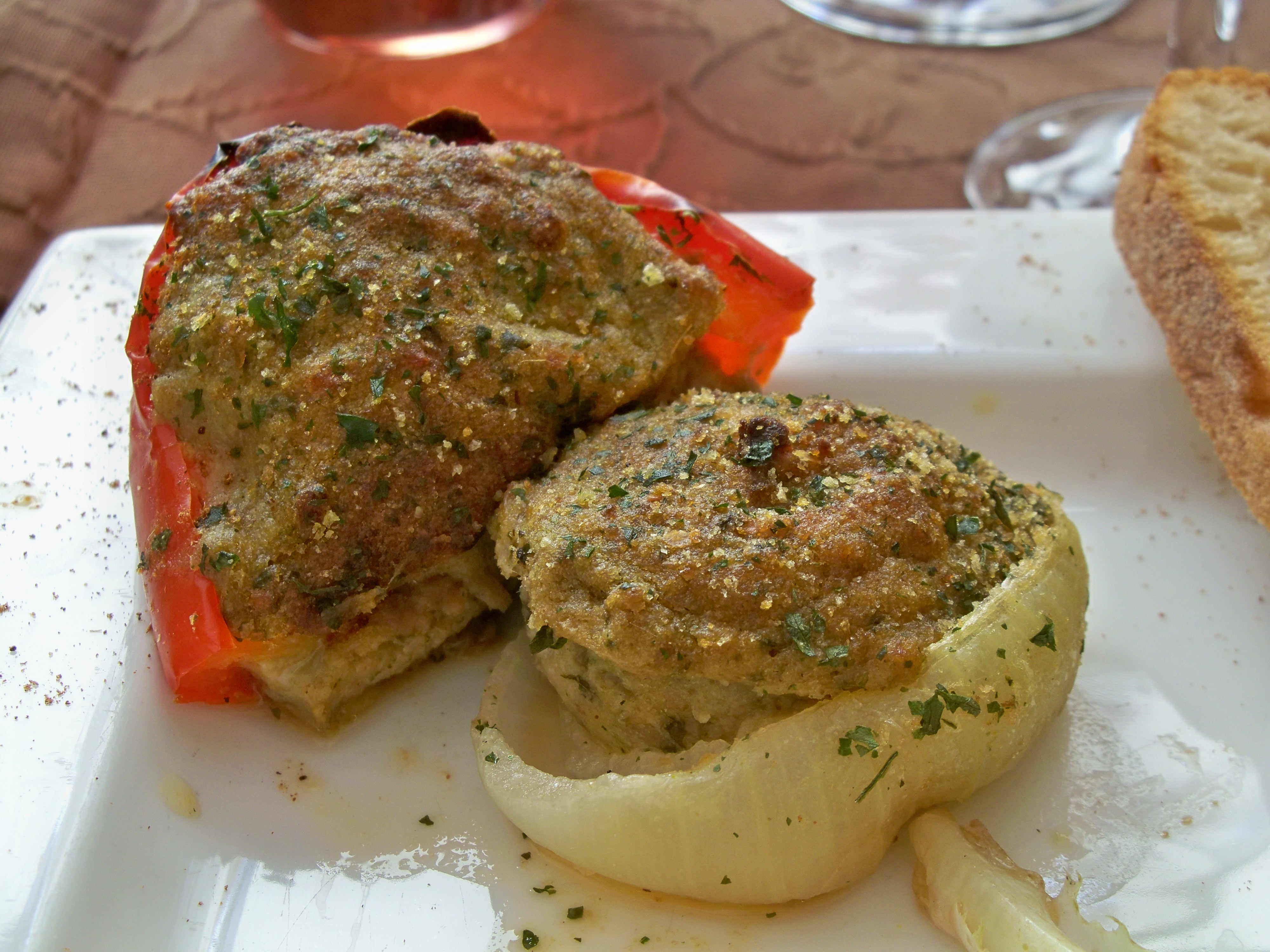 oignon et poivron farcis